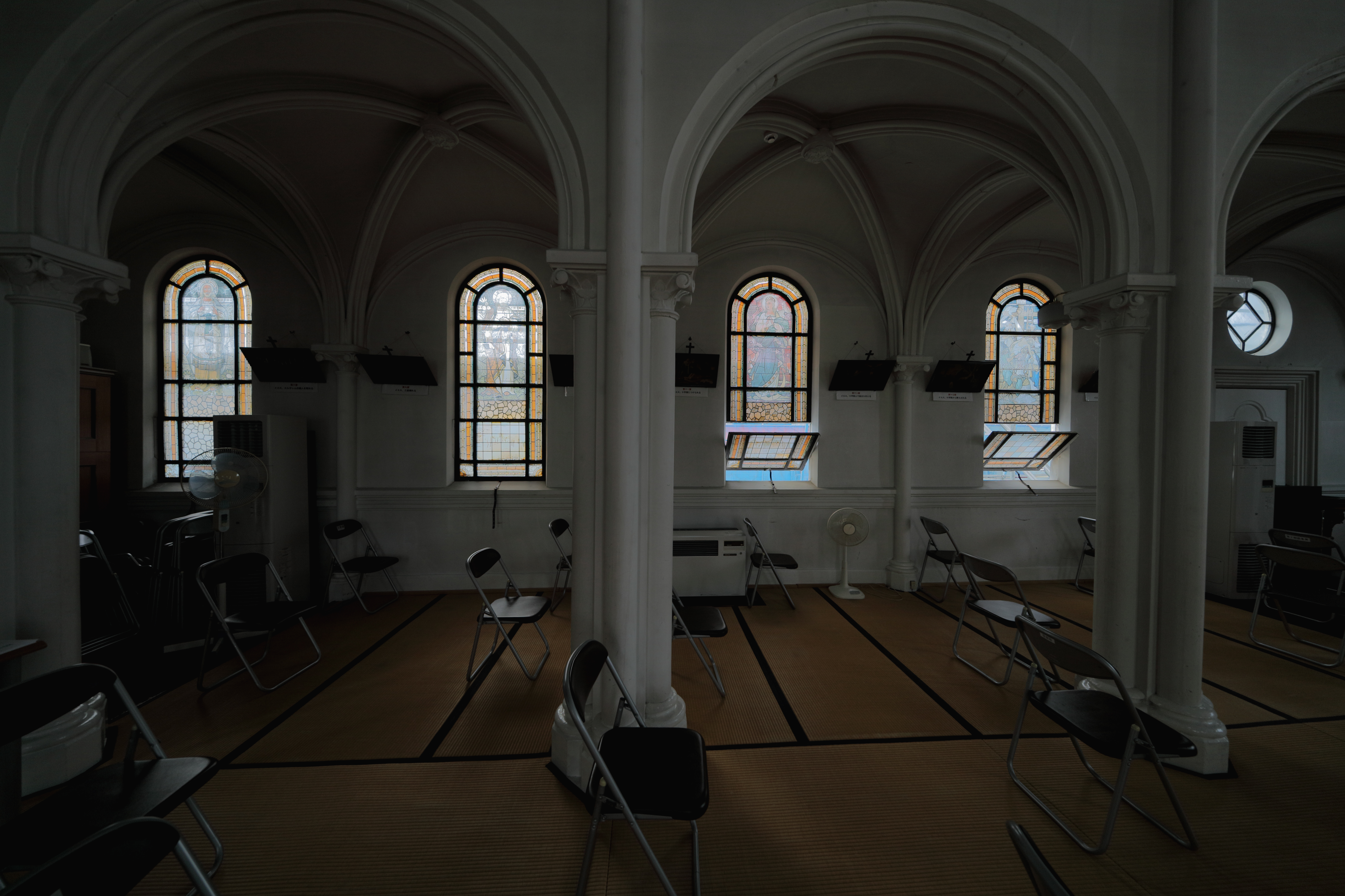 山形県鶴岡市にある鶴岡カトリック教会天主堂の窓。 日本国内では唯一の窓絵である。